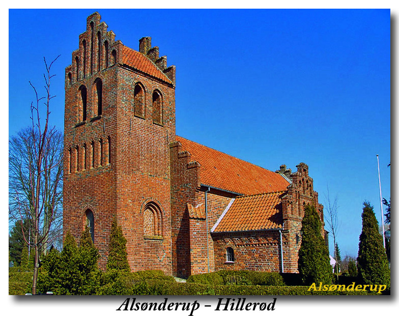 fra sydvest